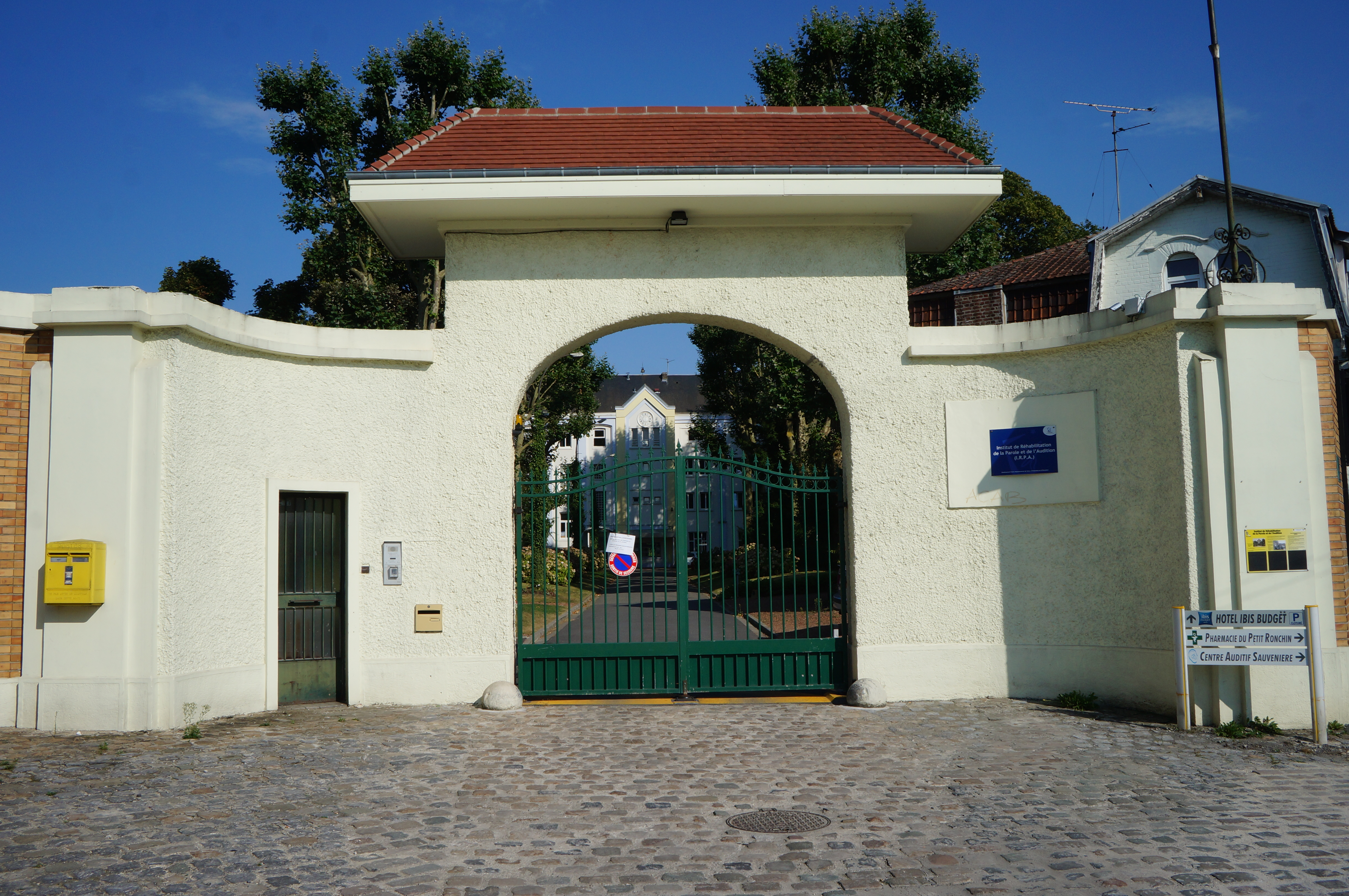 L' Institut de Réhabilitation de la Parole et de l’Audition Ronchin Nord.- France